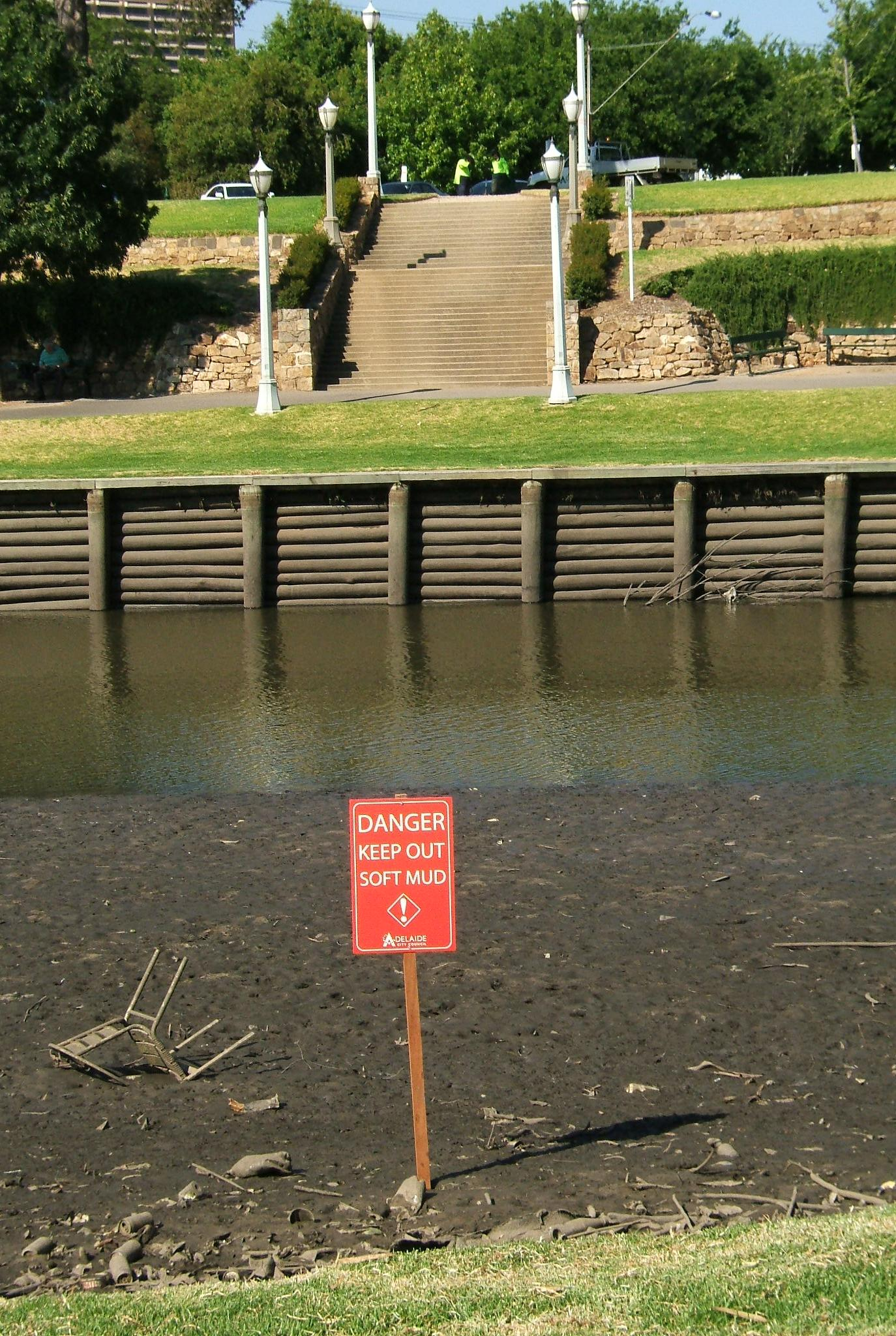 River Torrens